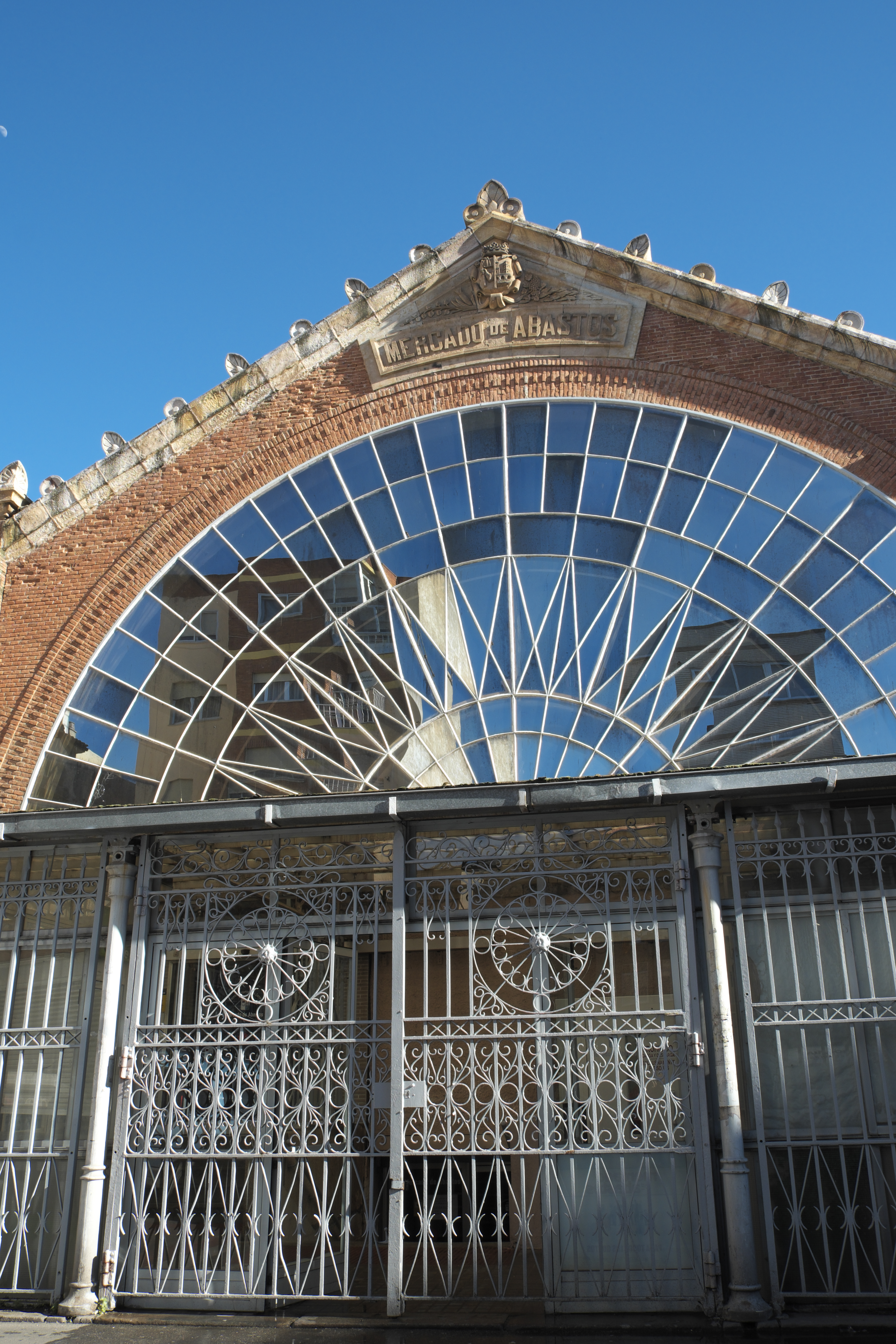 Mercado de Abastos (Markthalle) in Zamora (Kastilien-León/Spanien)